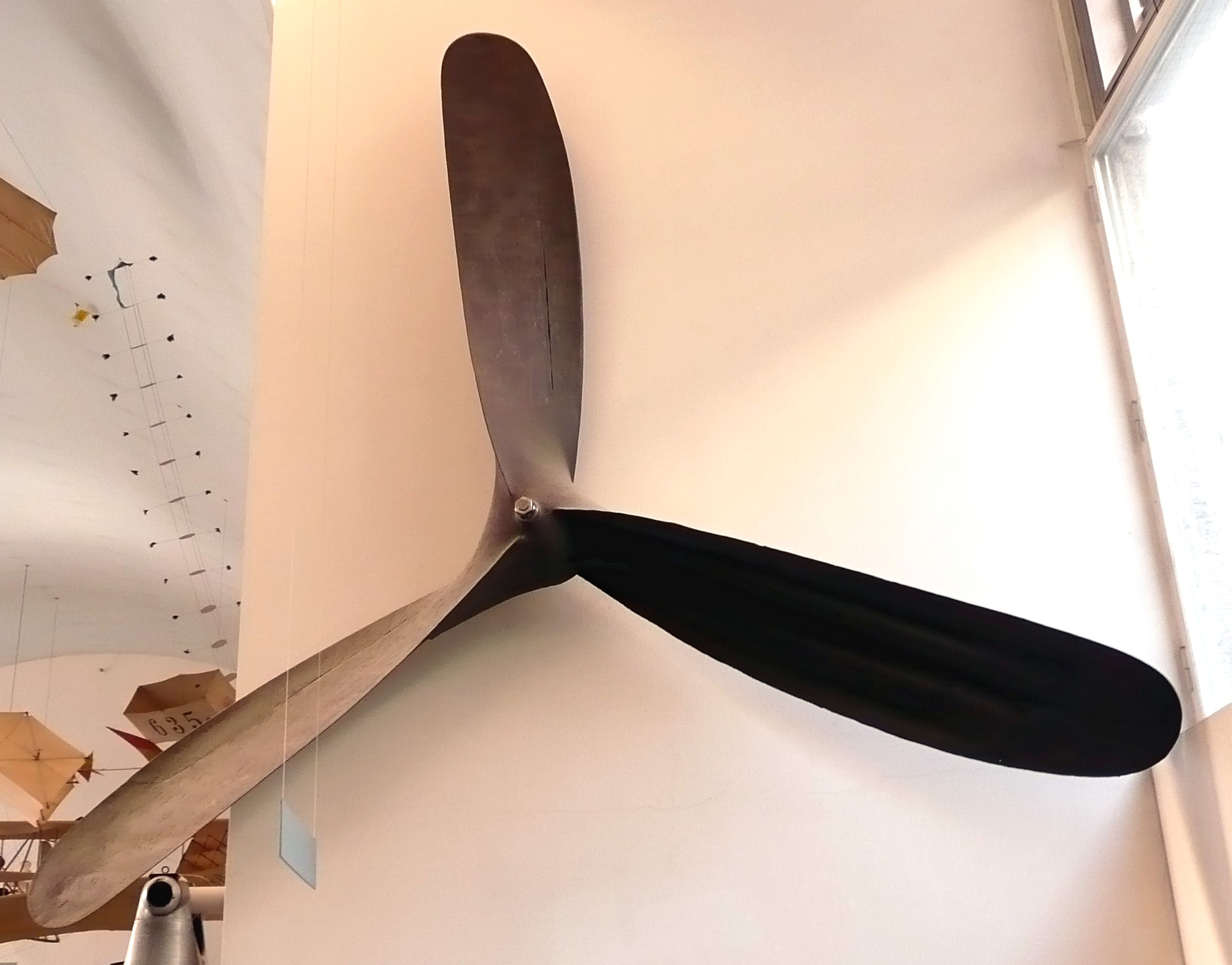 Luftschiffpropeller des Versuchsluftschiffes S.L.1 von Schütte Lanz mit 4,4 m. Durchmesser. Die zweischalige Blechschalenbauweise bewährte sich nich.